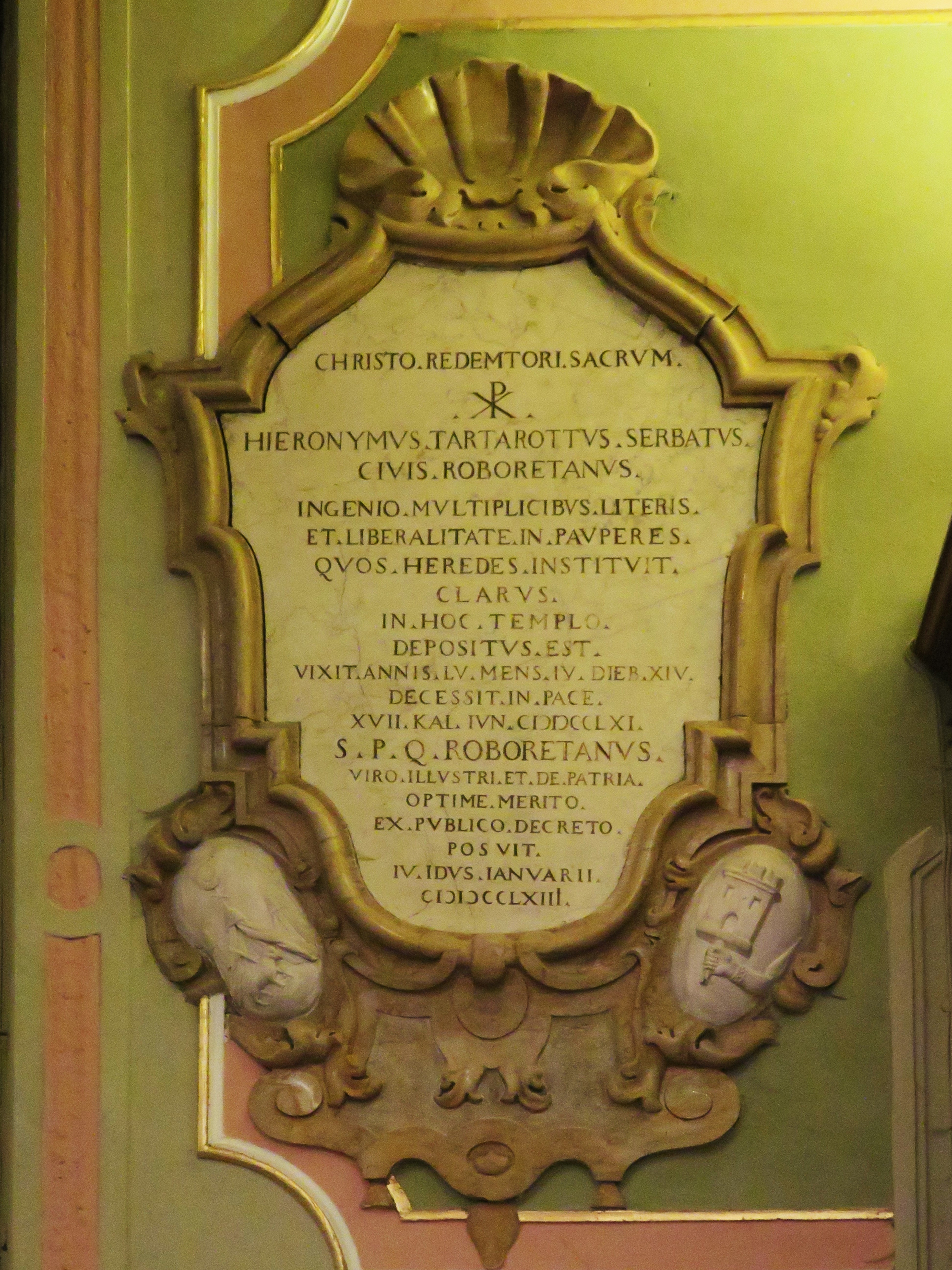 Epigrafe dedicata a Girolamo Tartarotti